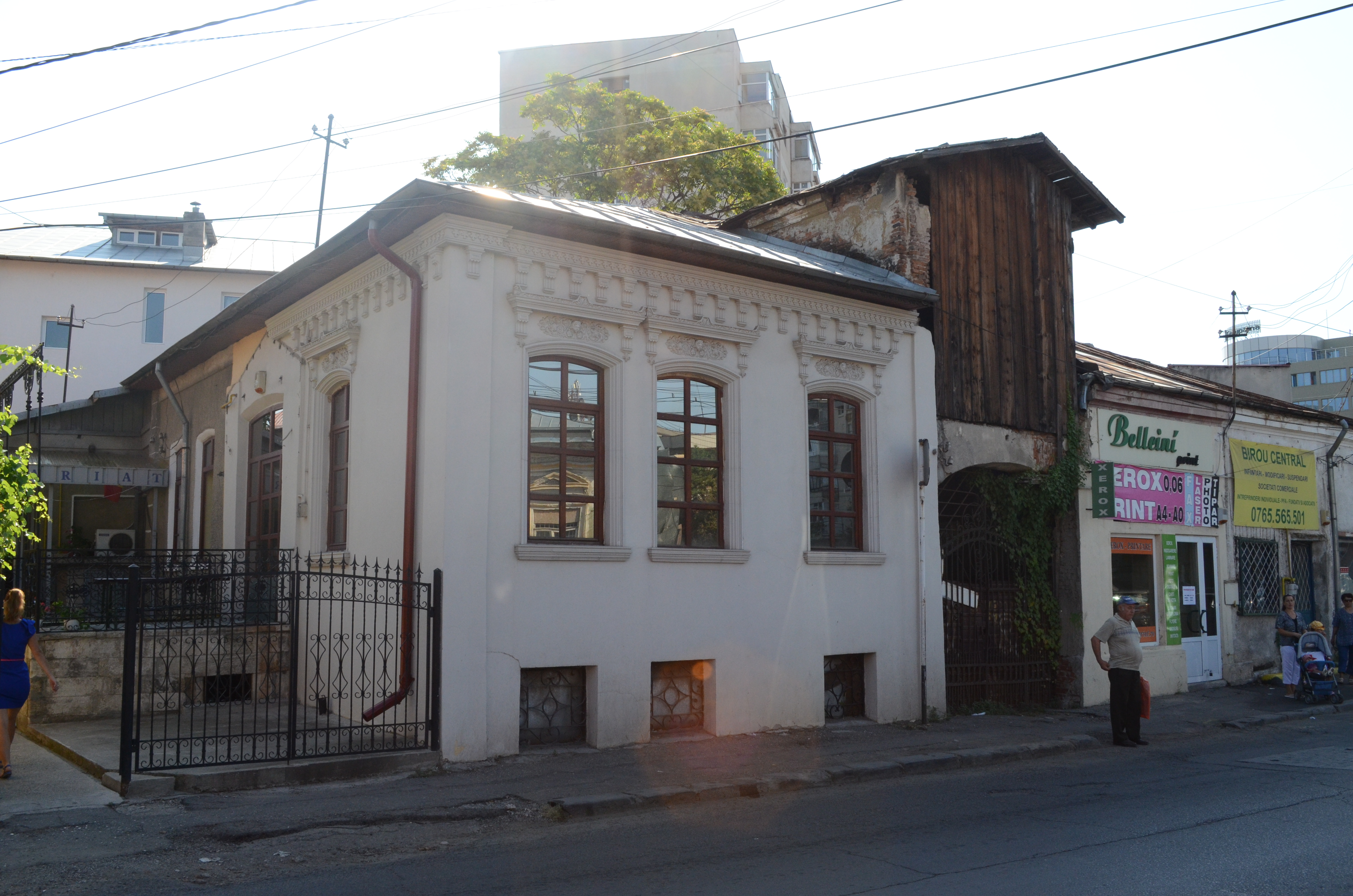 Casă cu prăvălie, Str. Romană nr. 46-48, Ploiești